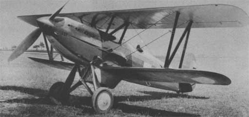 Prvý prototyp česko-slovenského stíhacieho lietadla typu Avia B-534